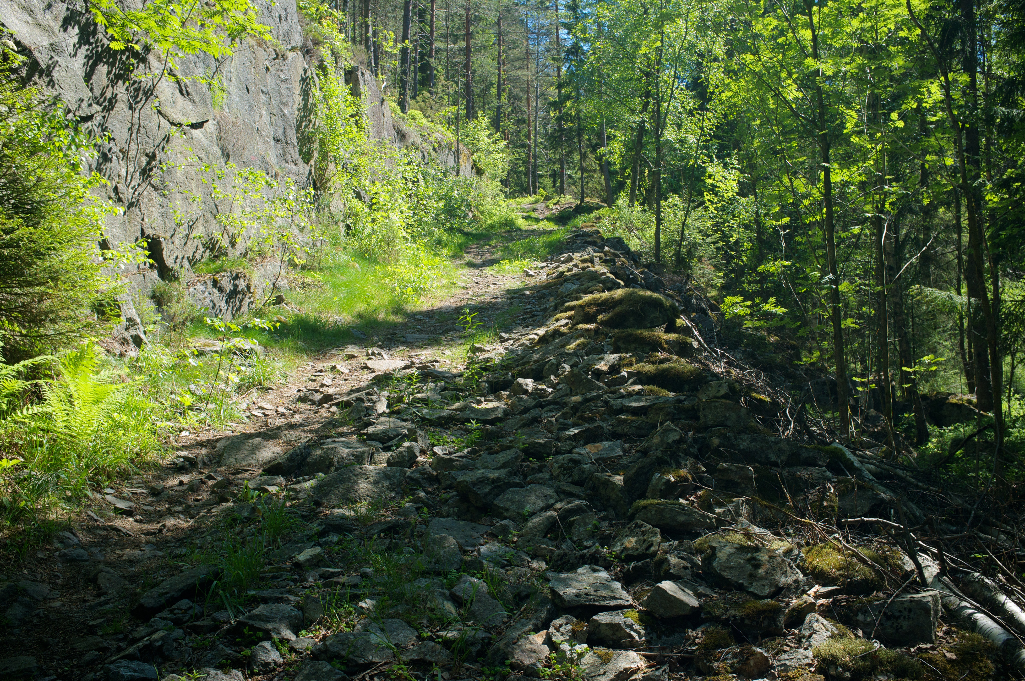 Cudriobakken i Østmarka i Oslo.